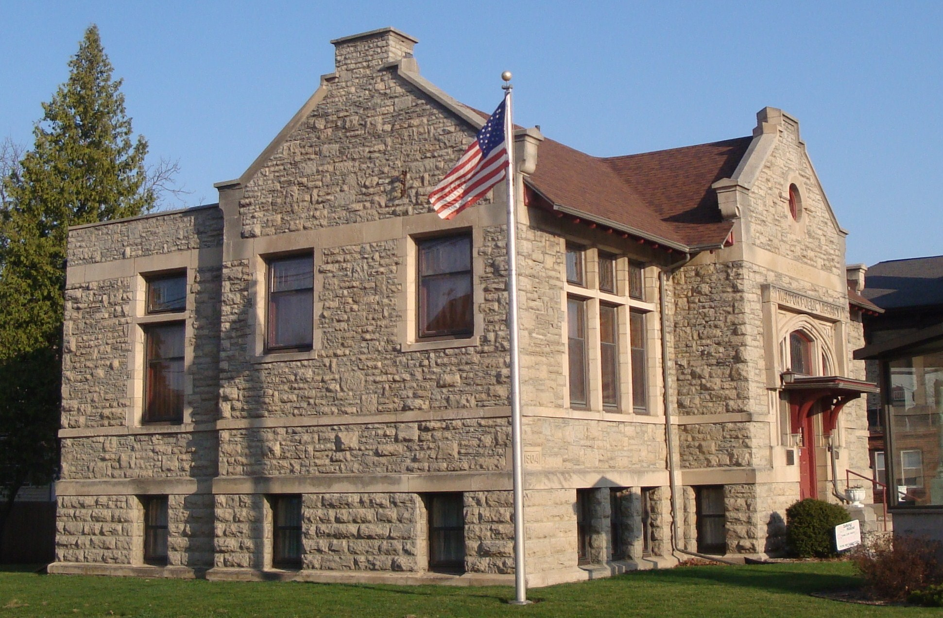 A Carnegie library in Waupun, Wisconsin National Register Date: 9/4/1979 State Register Date: 1/1/1989 Designer Name: H.A. FOELLER Cut Stone Cut Stone